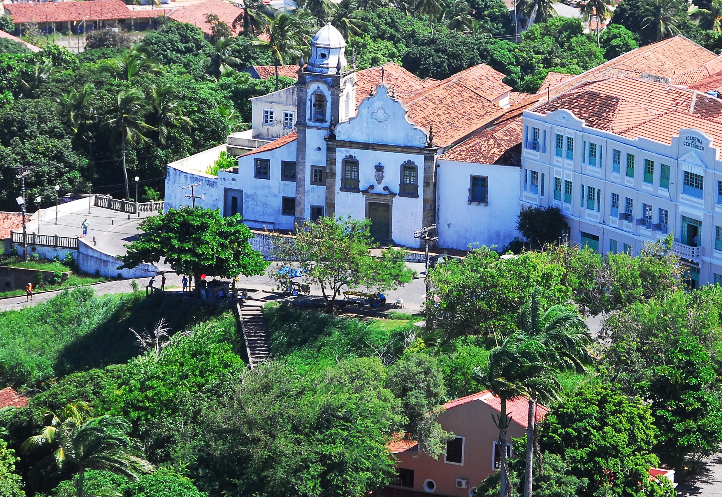 Foto: Passarinho/Pref.Olinda